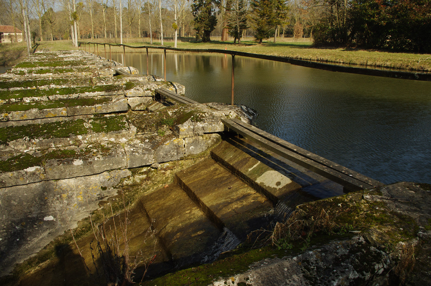 Déversoir à gradins régulant le courant et le niveau de la Mâble, XVIIe siècle, parc du château de Richelieu (Indre-et-Loire)